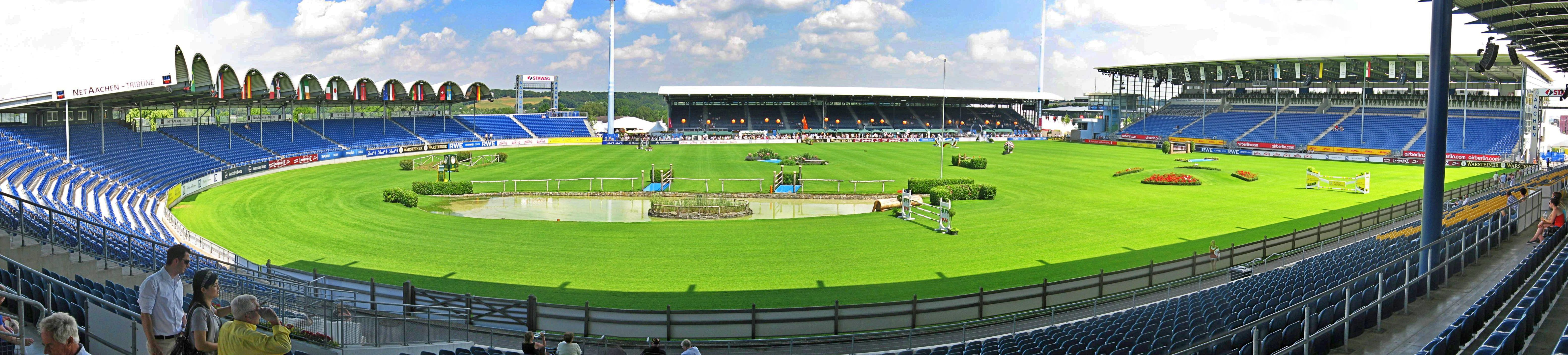 Das Reitstadion in der Aachener Soers, Austragungsort der Springreitwettbewerbe des CHIO Aachen.